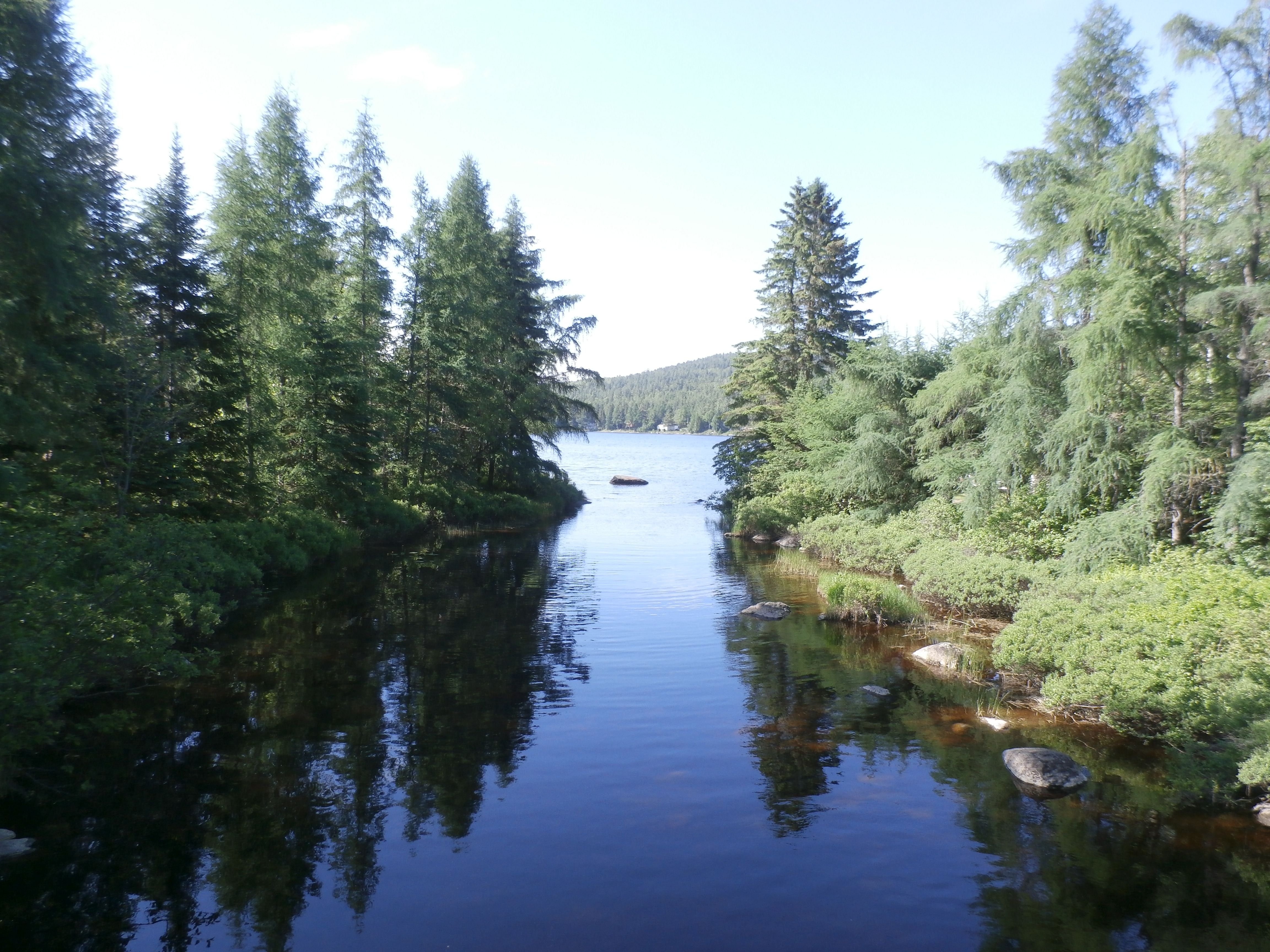 Rivière Ashberham à sa sortie du Petit lac Saint-François, qui est à l'arrière-plan.